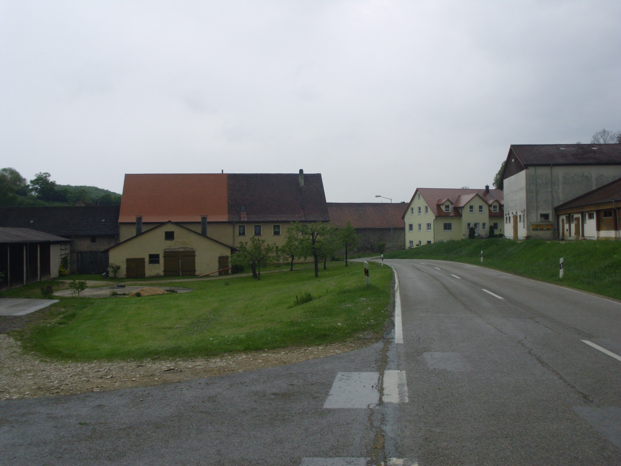 Rohrach, Ortsteil von Heidenheim (Mittelfranken) im Landkreis Weißenburg-Gunzenhausen